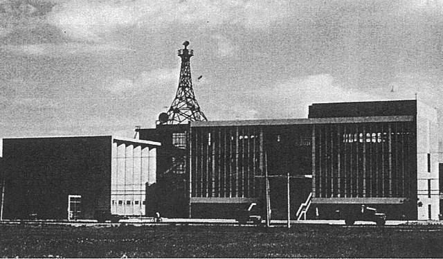 1962年臺灣電視公司委外興建完成的台視大樓，分為「中央大樓」（右）與「攝影大樓」（左）。兩棟大樓的設計及內部規劃者是沈祖海，設計時參考了當時美國一些電視大樓的設計。